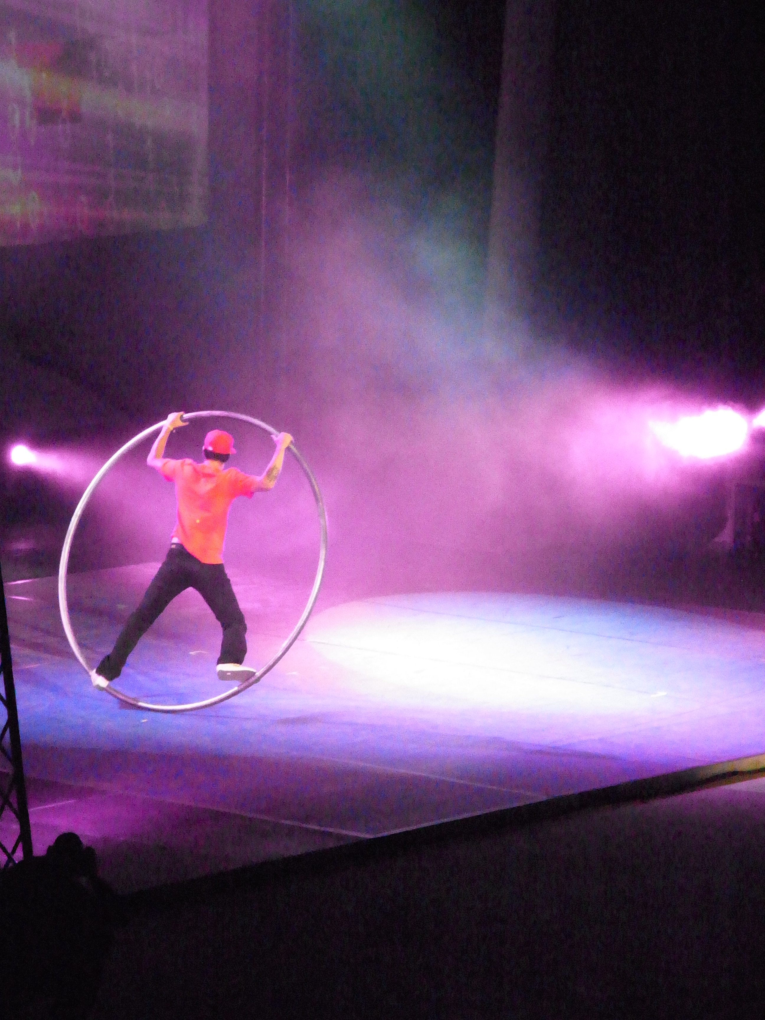 ExtraSchicht 2011, Nordsternpark: Urbanatix in der Arena